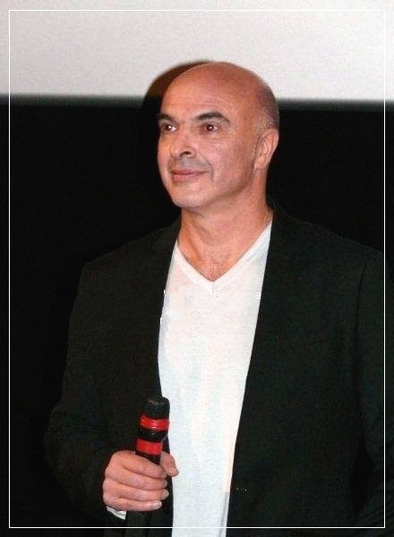 JPL lors d'un débat après une projection de "Arrêtez-moi".